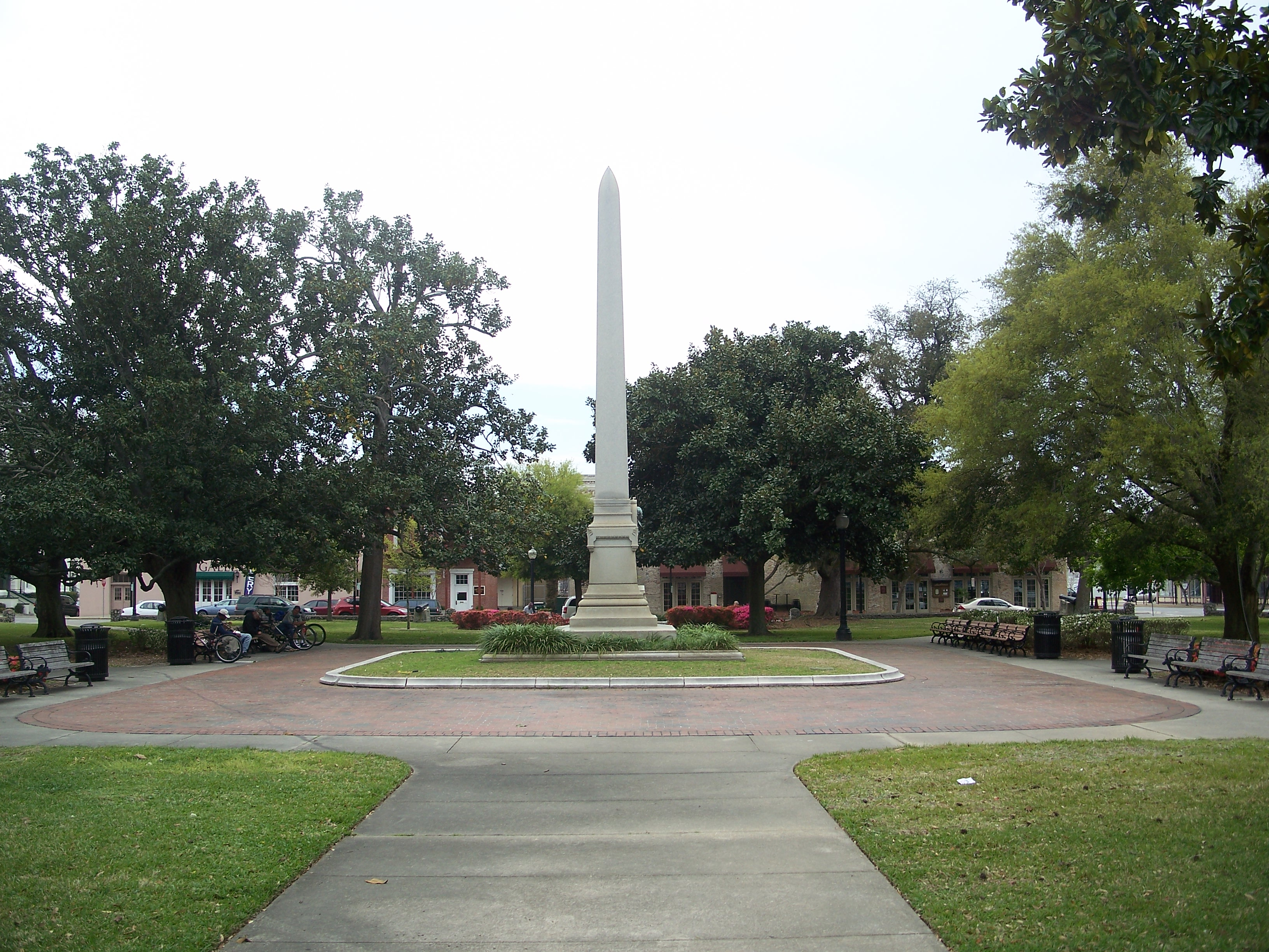 Pensacola, Florida: Plaza Ferdinand VII.